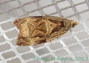 Eccopsis incultana (Walker, 1863)